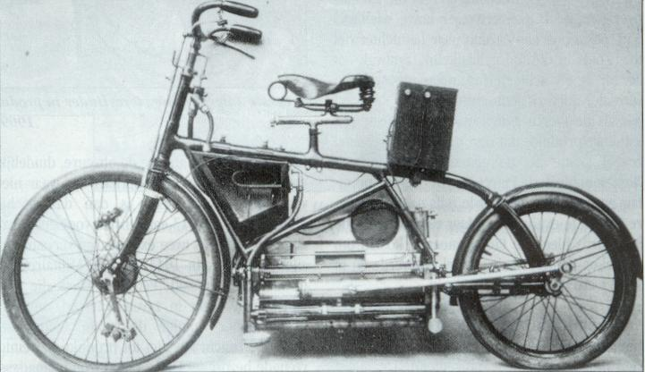 Opengewerkt model van de Holden-viercilinder.